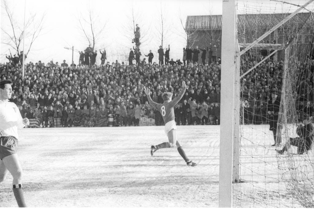 im Holsteinstadion vor 17.000 Zuschauern.